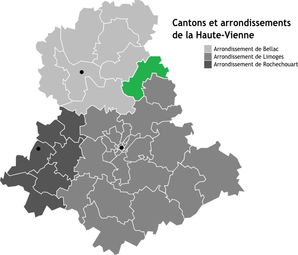 Canton de Bessines-sur-Gartempe, Limousin, France en Carte des arrondissements de la Haute-Vienne